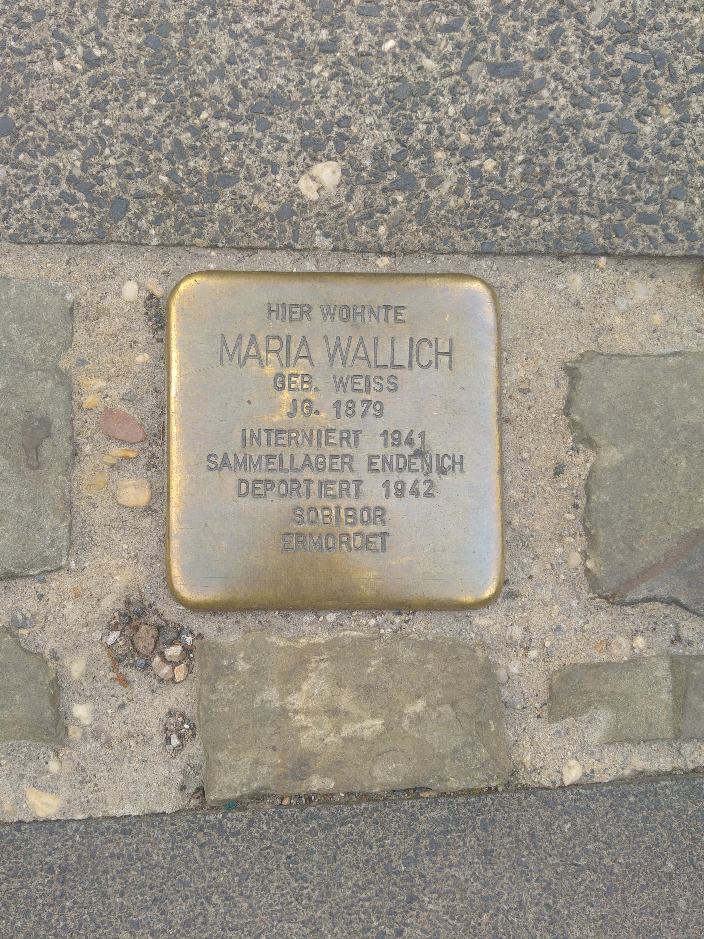 Stolperstein für Maria Wallich (verlegt 2019), Poppelsdorfer Allee 24, Bonn-Weststadt